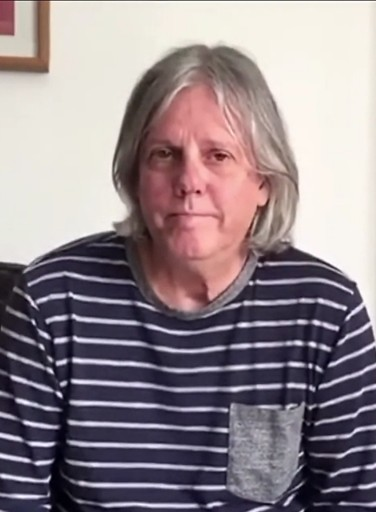 Alejandro García Villalón, mejor conocido como Virulo. Humorista. Nacido en La Habana, Cuba en 1955.